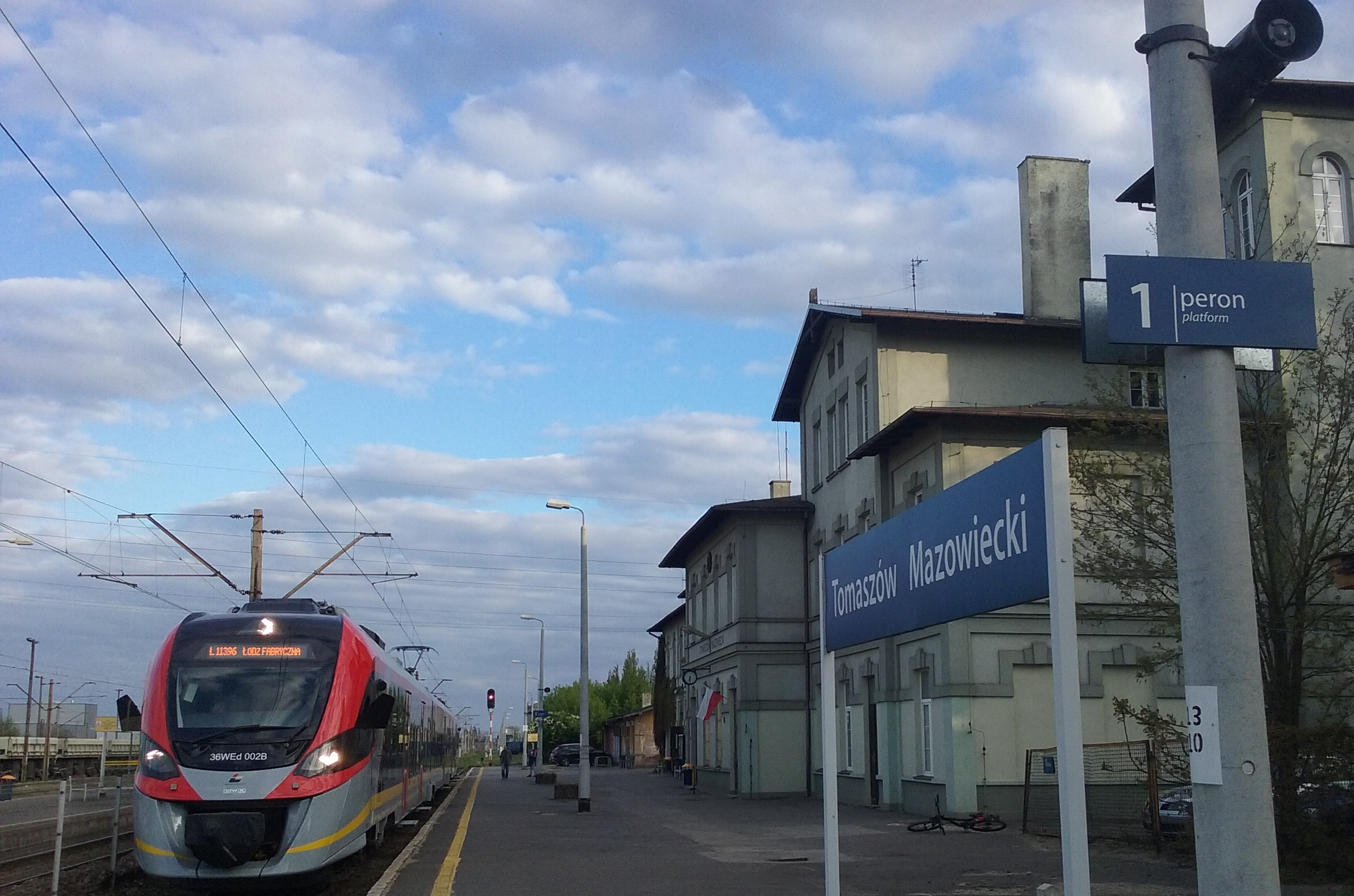 Tomaszów Mazowiecki - Pociąg Łódzkiej Kolei Aglomareacyjnej na stacji.